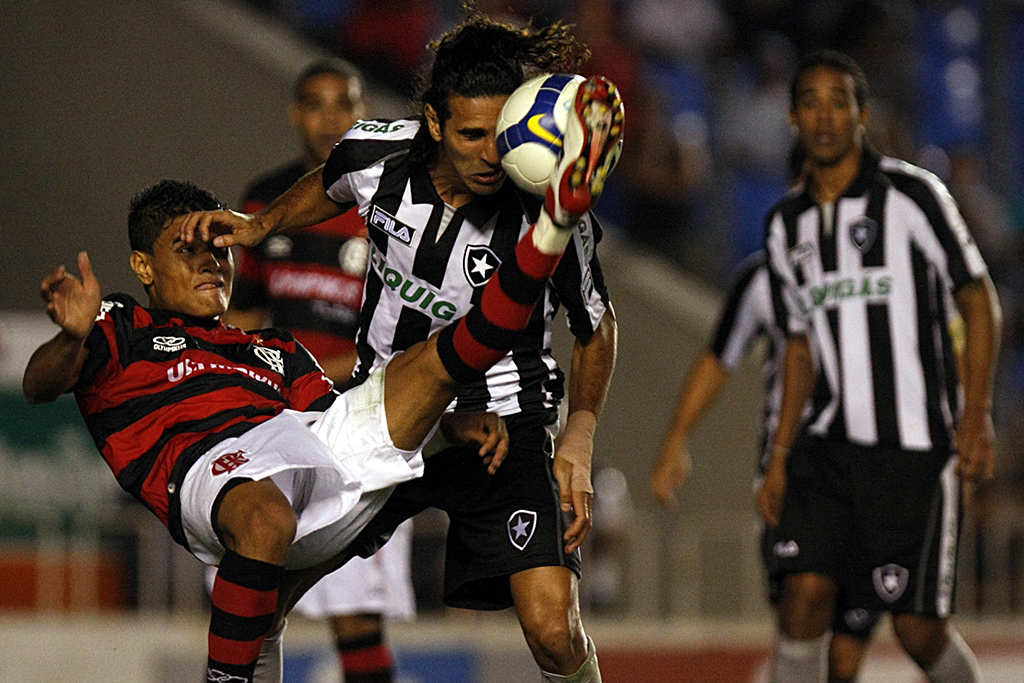 Flamengo 2 x 2 Botafogo